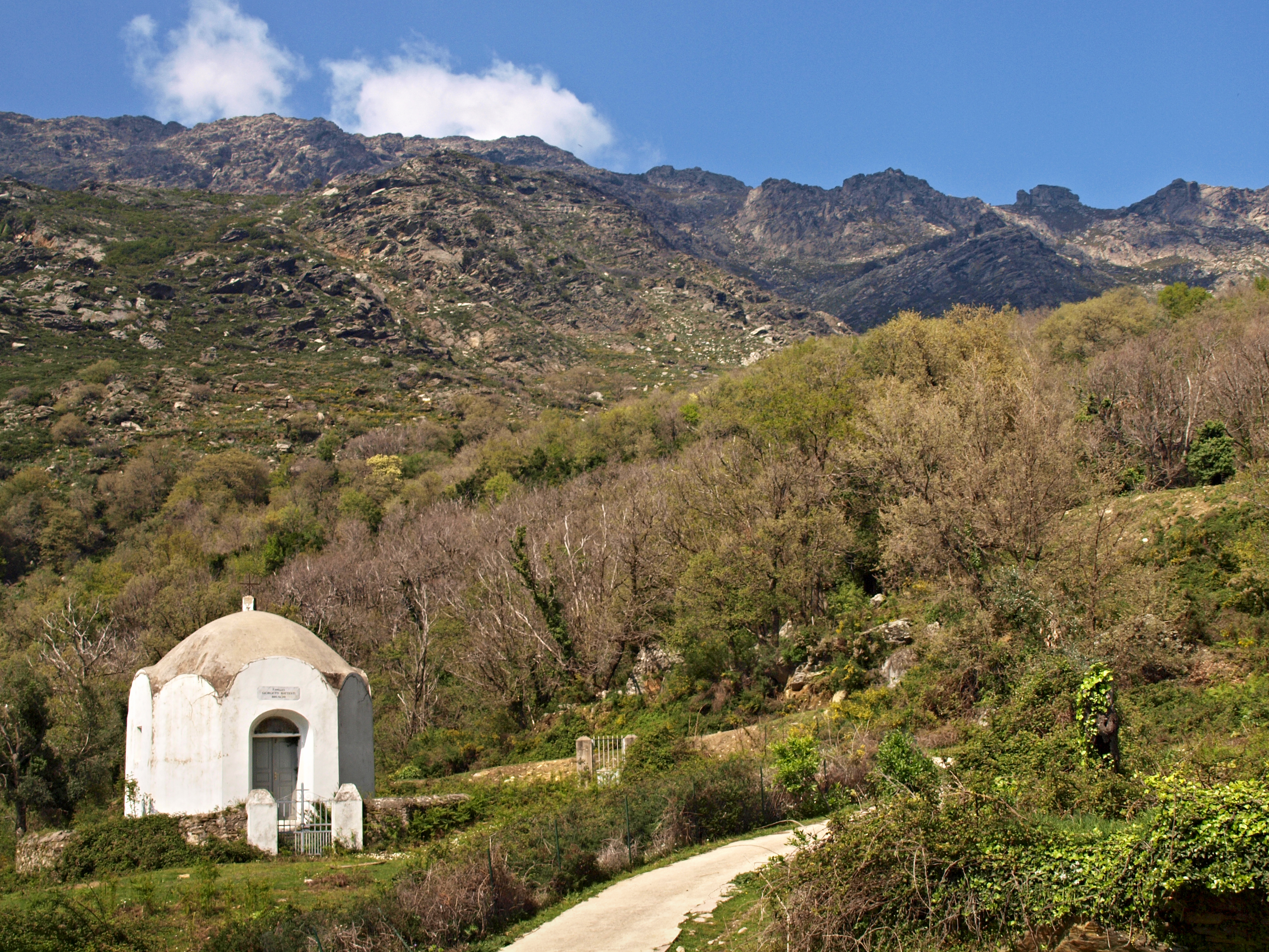 Olcani (Corsica) - Vallon du ruisseau de l'Alberghi